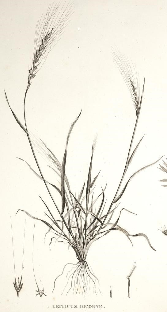 f ■ J H.N 4 BolaiiK.^iie par 7/ Ih-ldey -. t PJ.i5. y ■ i " y I 1 Il TIC UM C ORWE 2 AJl AURïrULATA.. . ' y 3 âmma:^ma^^egy";ptiac:a. yy.-;- ,/i/ .* ife